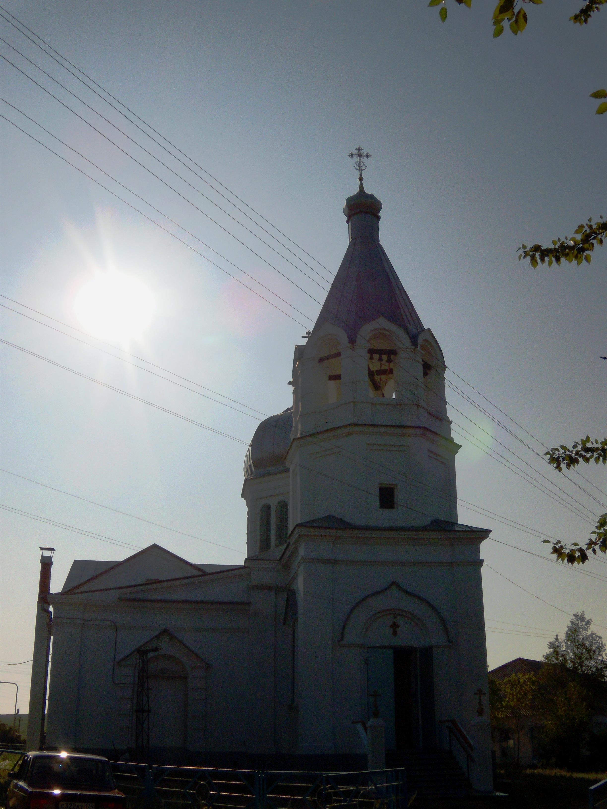 (Челябинская область, Троицкий район, село Клястицкое (Солодянка))